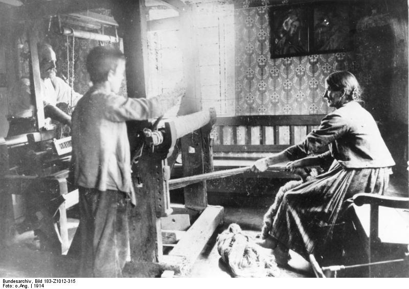 ADN-ZB/Archiv Deutschland: Heimarbeit am Webstuhl. (Aufnahme: 1914)